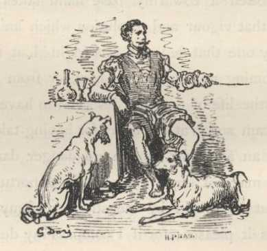 Gustave Doré, ilustração para "Dom Quixote" de Miguel de Cervantes